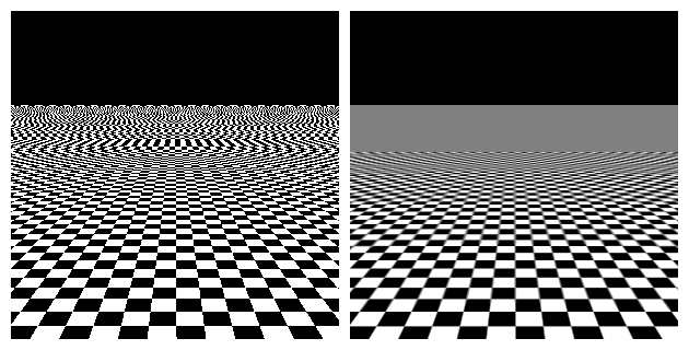 Porównanie teksturowania bez/z wykorzystaniem techniki mipmappingu. Autor rysunku: Wojciech mula.